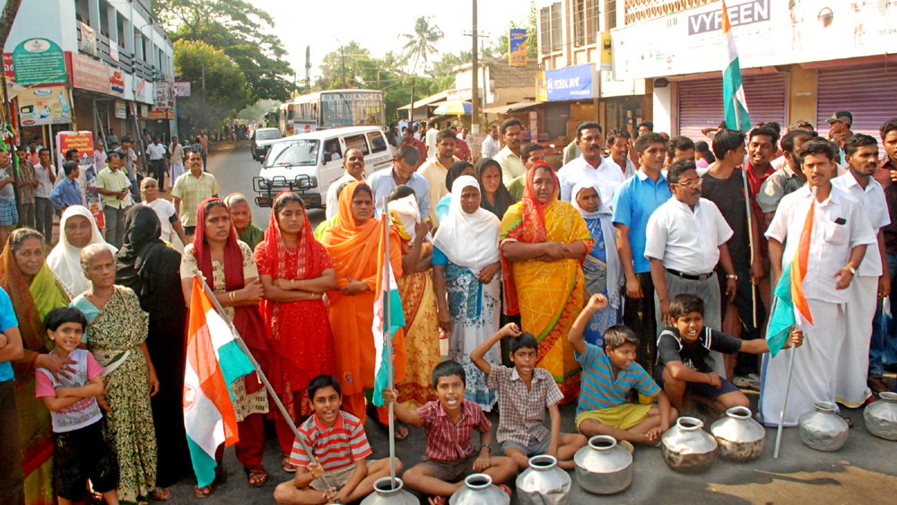 കുടിവെള്ളം മുടങ്ങിയതിൽ പ്രതിഷേധിച്ച് നടത്തുന്ന റോഡുപരോധം